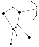 Orion med svärd och pilbåge.